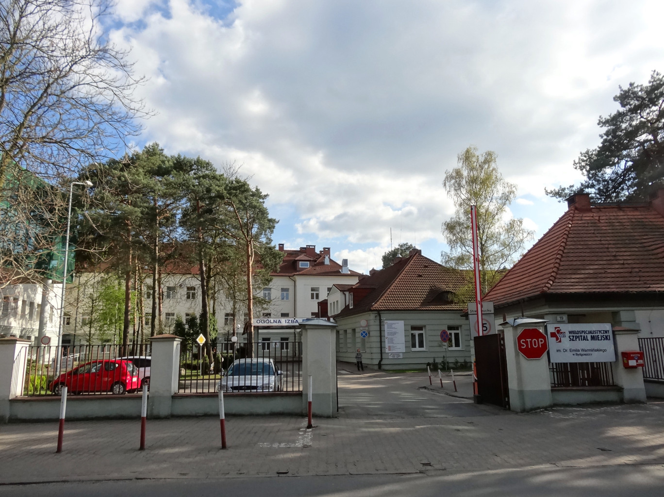 Wielospecjalistyczny Szpital Miejski im. dr. Emila Warmińskiego w Bydgoszczy przy ul. Szpitalnej 19